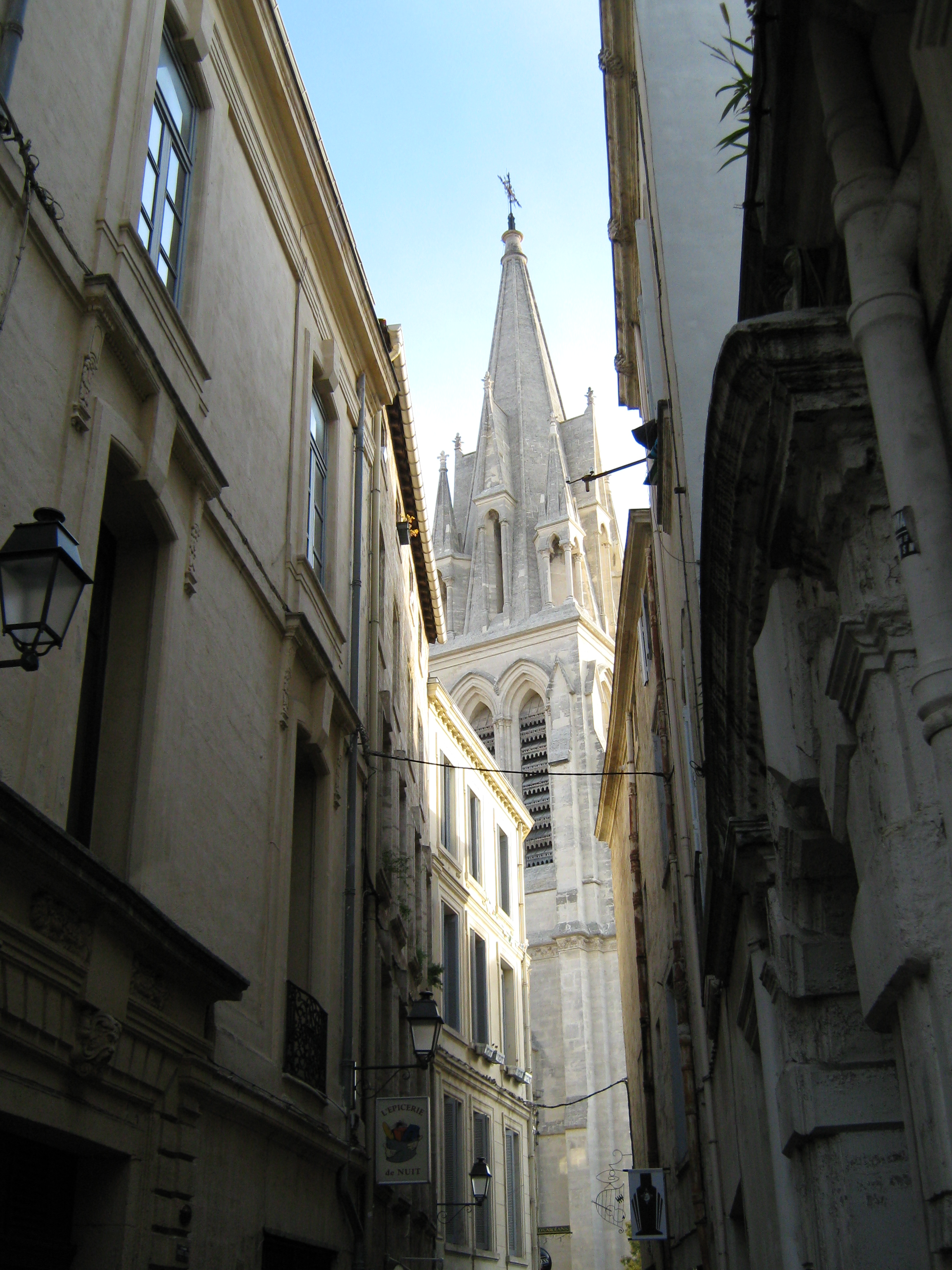 собор святой Анны в конце переулка